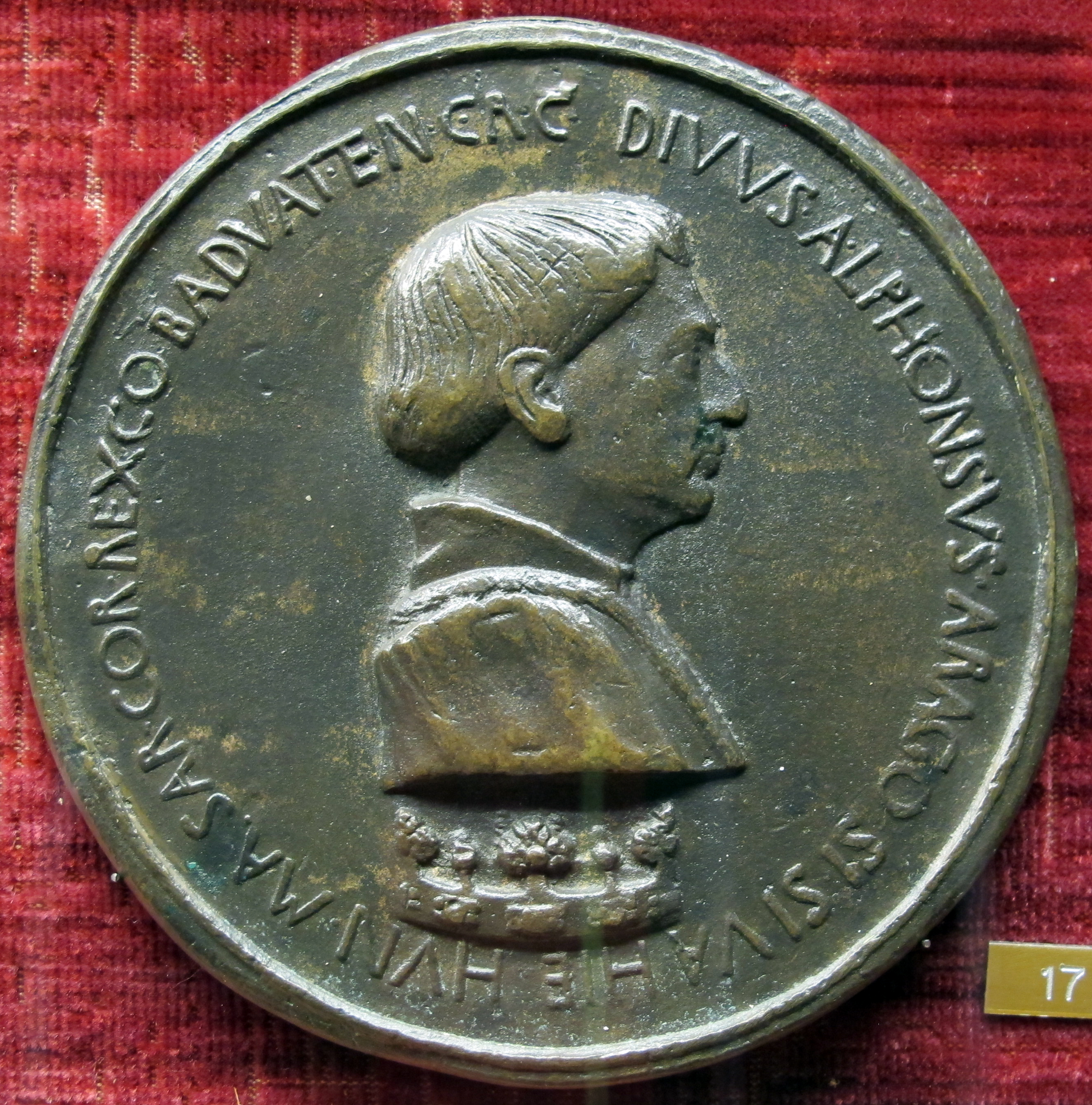 Pisanello, Seconda medaglia di Alfonso V di Aragona, recto